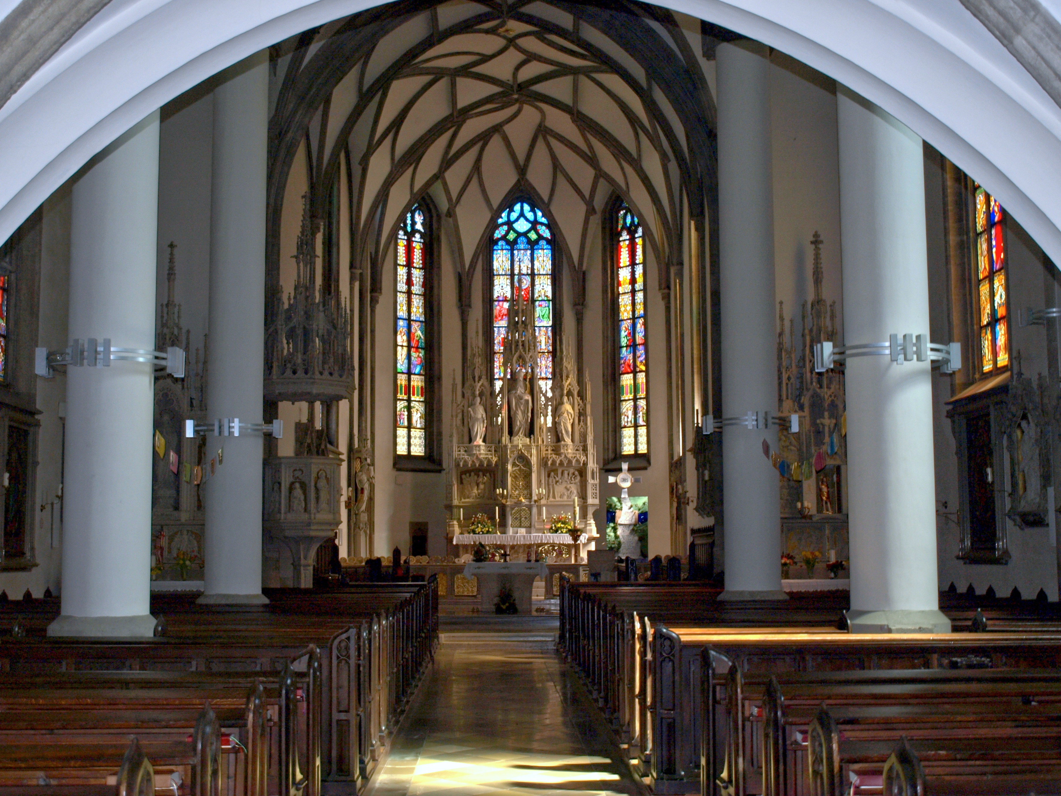 Kath. Pfarrkirche hl. Valentin